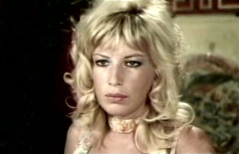 Képkocka a „Narancsos kacsasült” című filmből